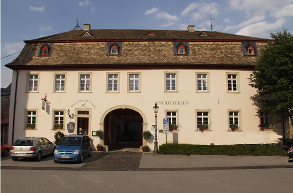 Gasthaus Engel